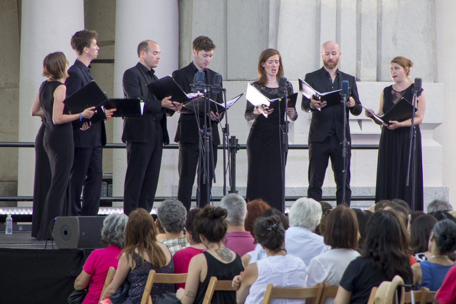 Stile Antico, una de las principales agrupaciones de música vocal antigua, ganó ayer nuevos seguidores durante su primer concierto en Madrid. Esta primicia, disfrutada con emoción por los asistentes a la singular cita, en el pórtico de la entrada principal del cementerio de la Almudena, congregó a aficionados a la música antigua y a espectadores que la descubrían por primera vez, con aplauso unánime de unos y de otros.